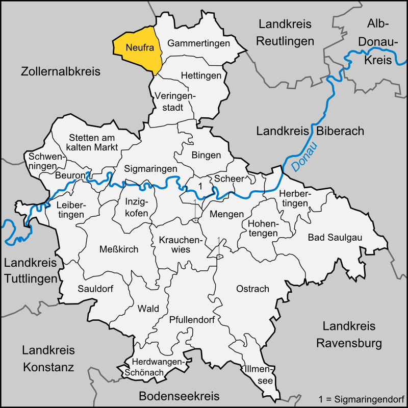 Karte der Gemeinde Neufra im Landkreis Sigmaringen